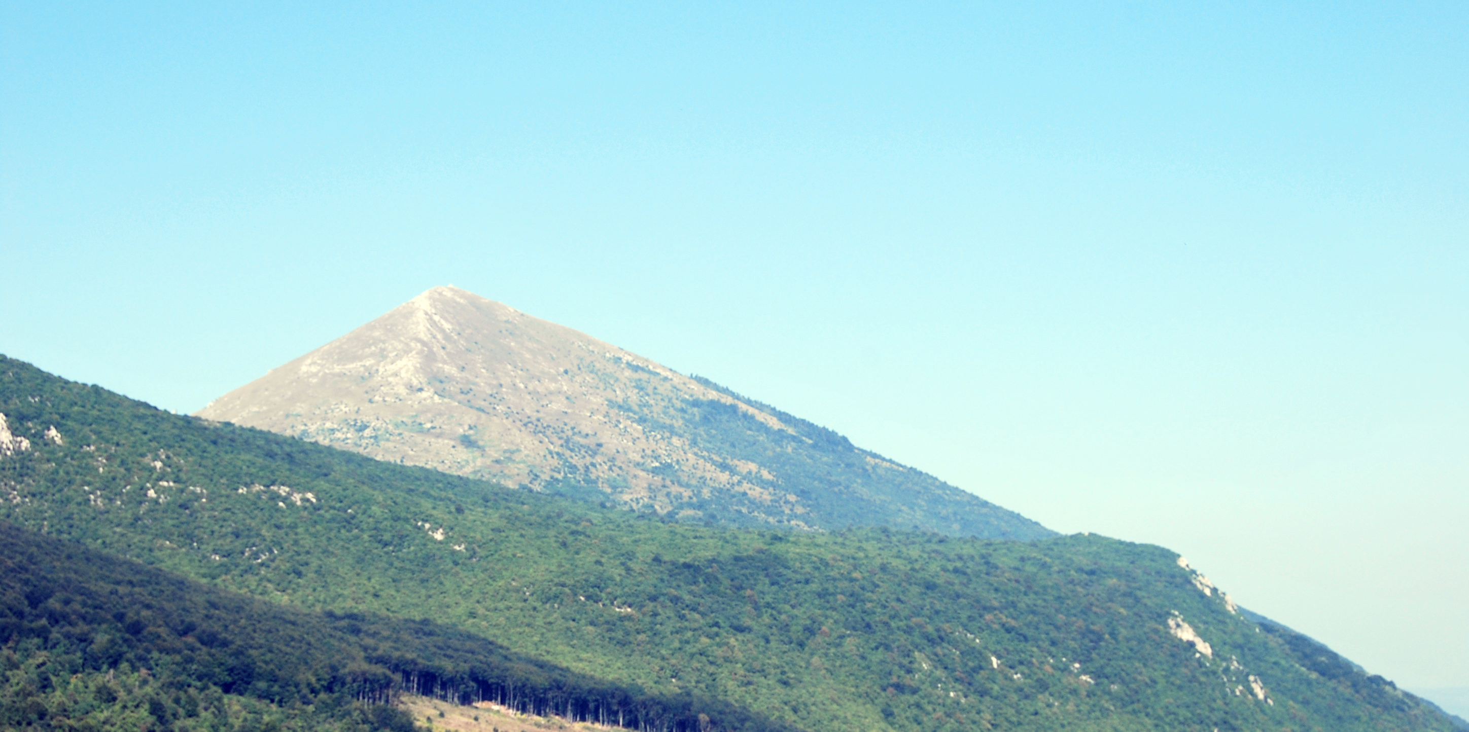 Planina Rtanj